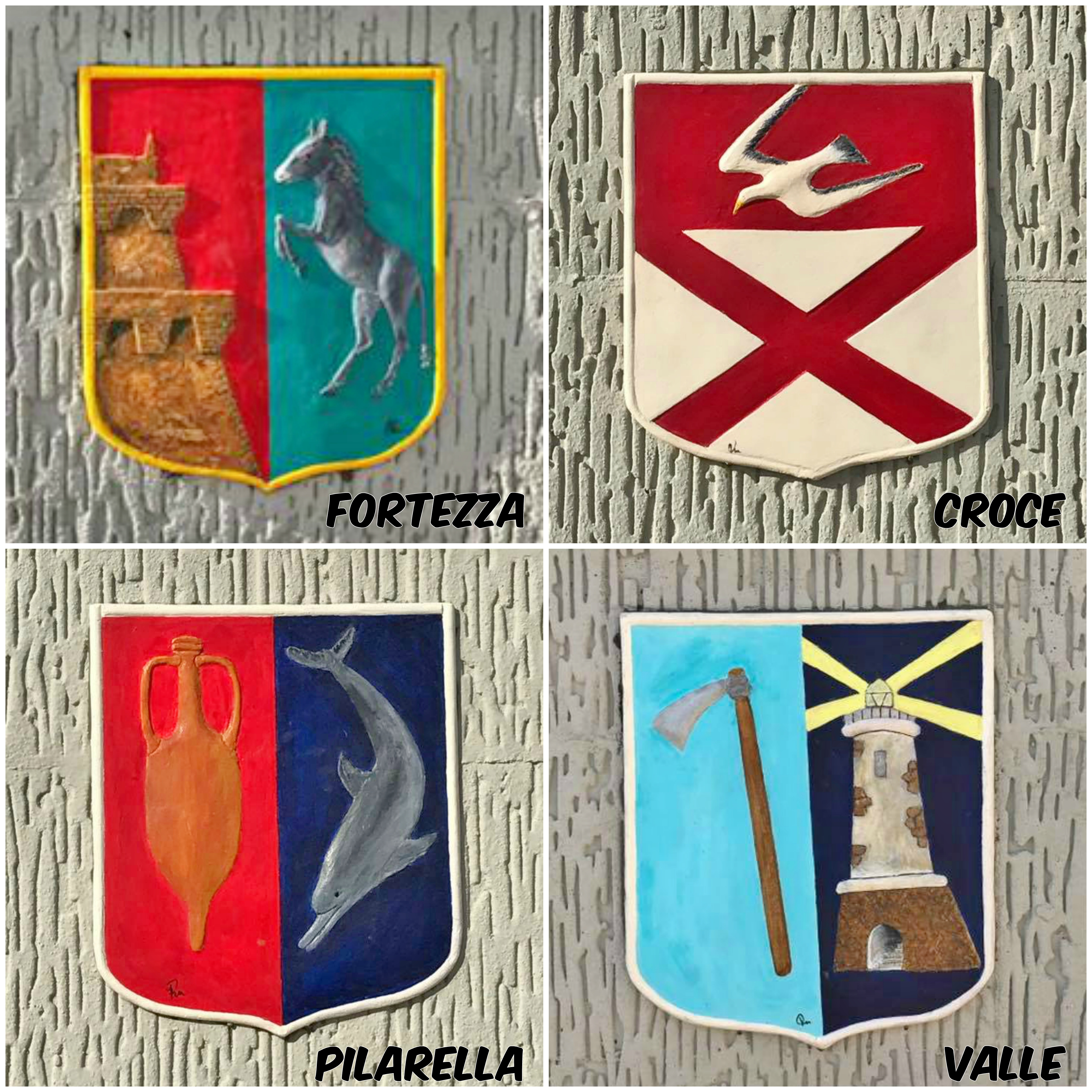 Stemmi dei Rioni cittadini di Porto Santo Stefano GR. Collage creato da Ceppicone.